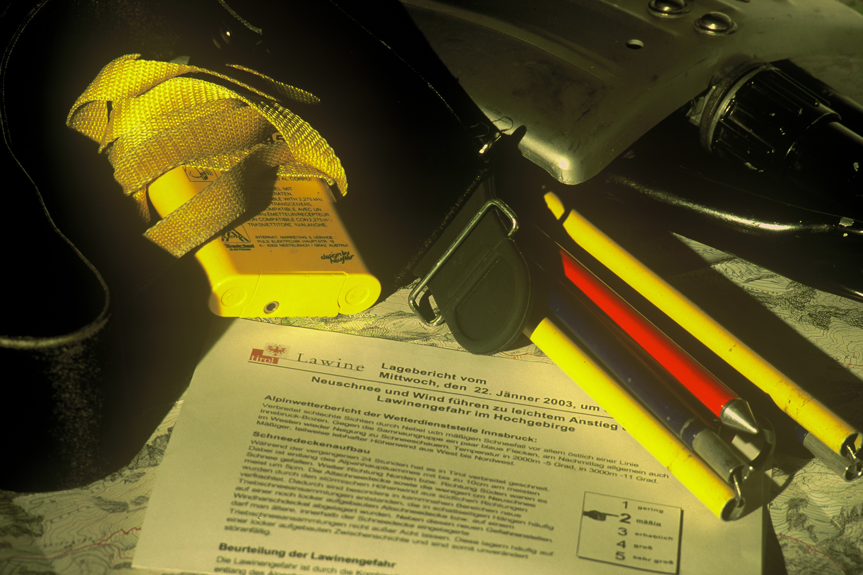 Teil einer Skitourenausrüstung: Lawinen-Verschüttetensuchgerät, Sonde, Schaufel, Karte, Steigfelle, Lawinenbulletin